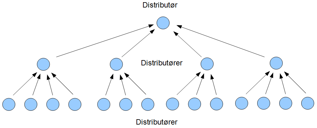 Grafisk presentasjon som viser hvordan et pyramidespill i flere nivåer er bygget opp.